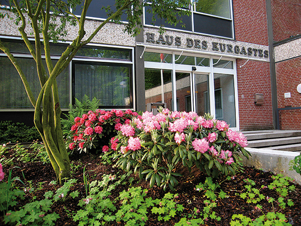 Kurhauseingang am Eingang zum Kurpark